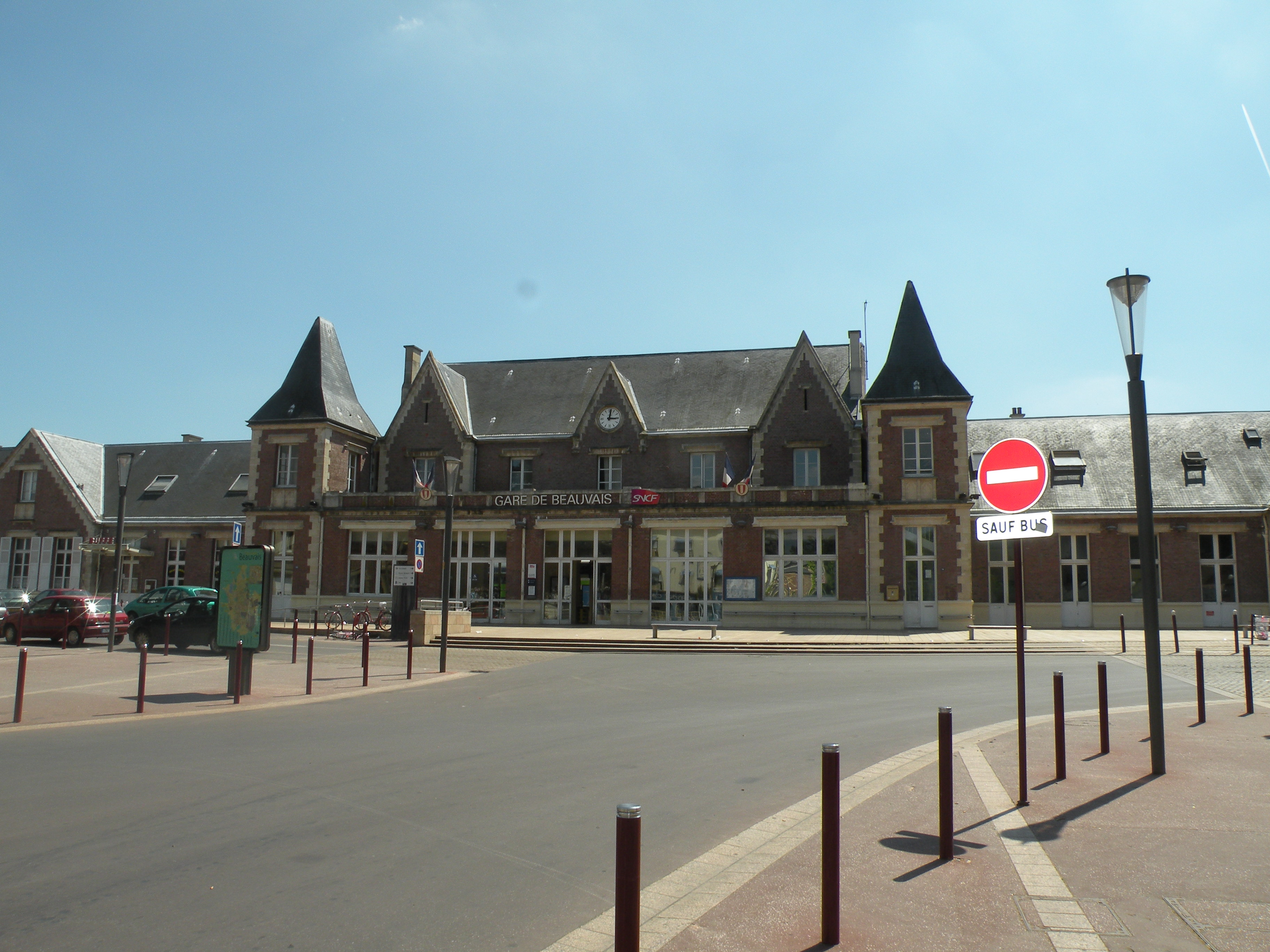 façade de la gare de beauvais, oise, france